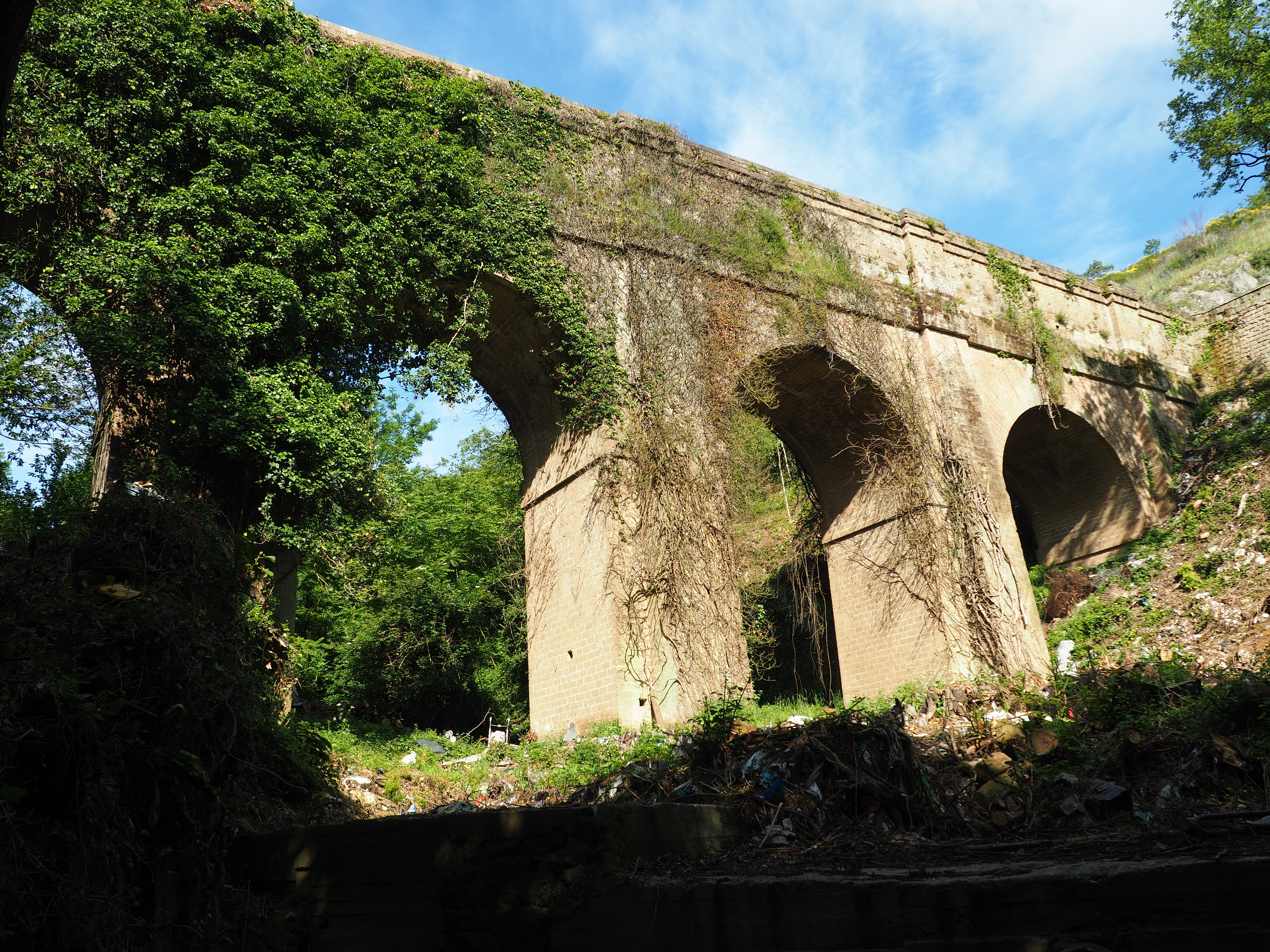 Ponte della valle di Durazzano secondo ponte dell'Acquedotto Carolino. Fondato il 30 aprile 1760 da Luigi Vanvitelli